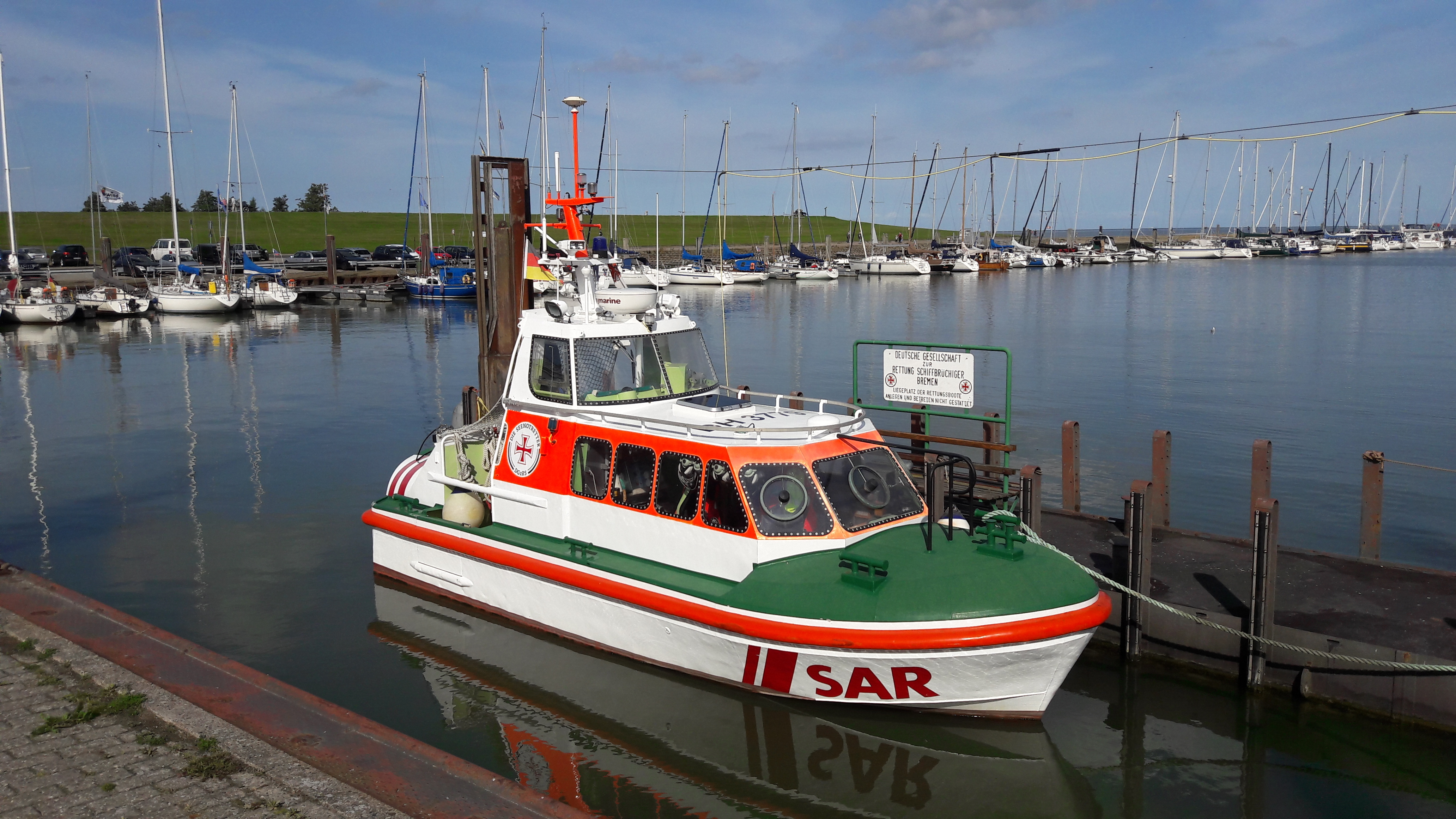 SRB Baltrum im Hafen von Horumersiel. Aufgenommen am 14. September 2019